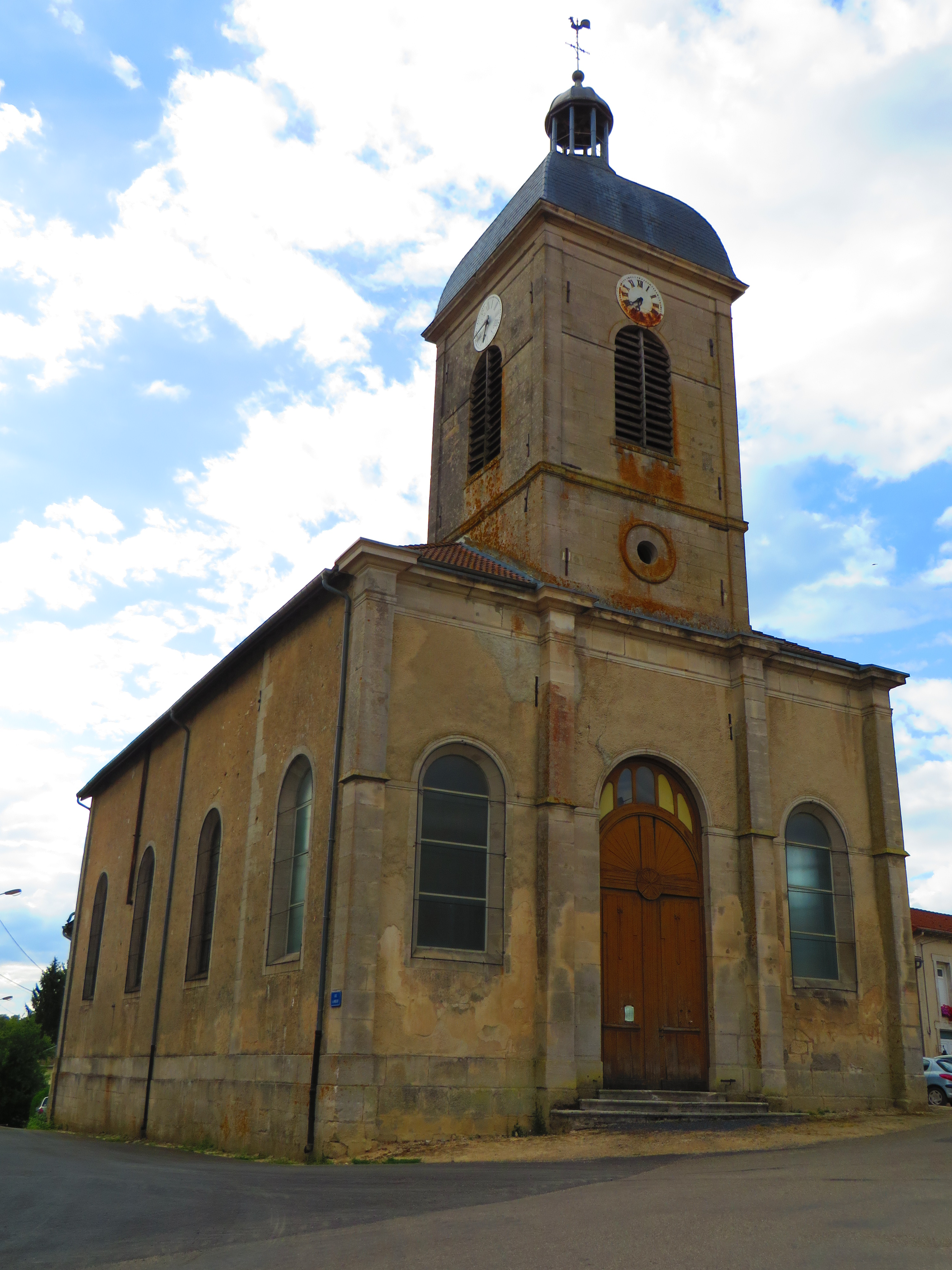 Ranzières L'église Saint-Étienne